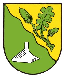 Wappen von Albessen